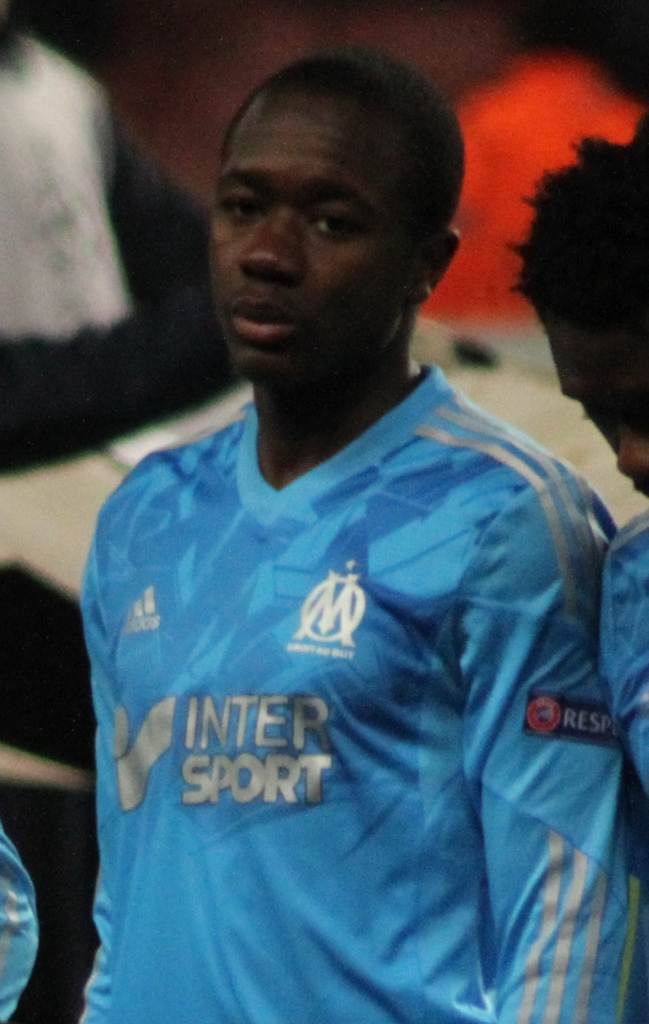 Marseille line up